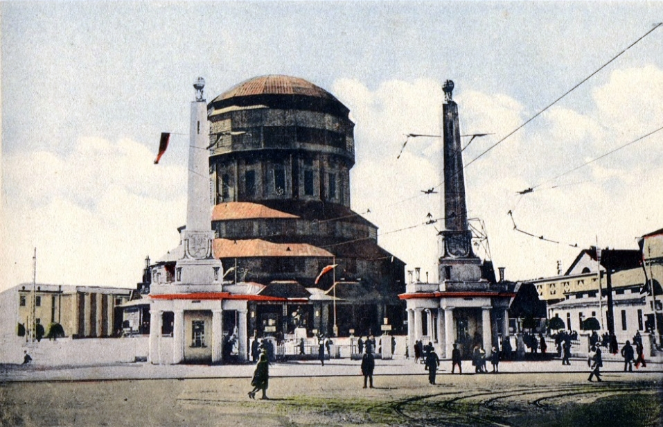 PWK 1929 - wieża Górnośląska